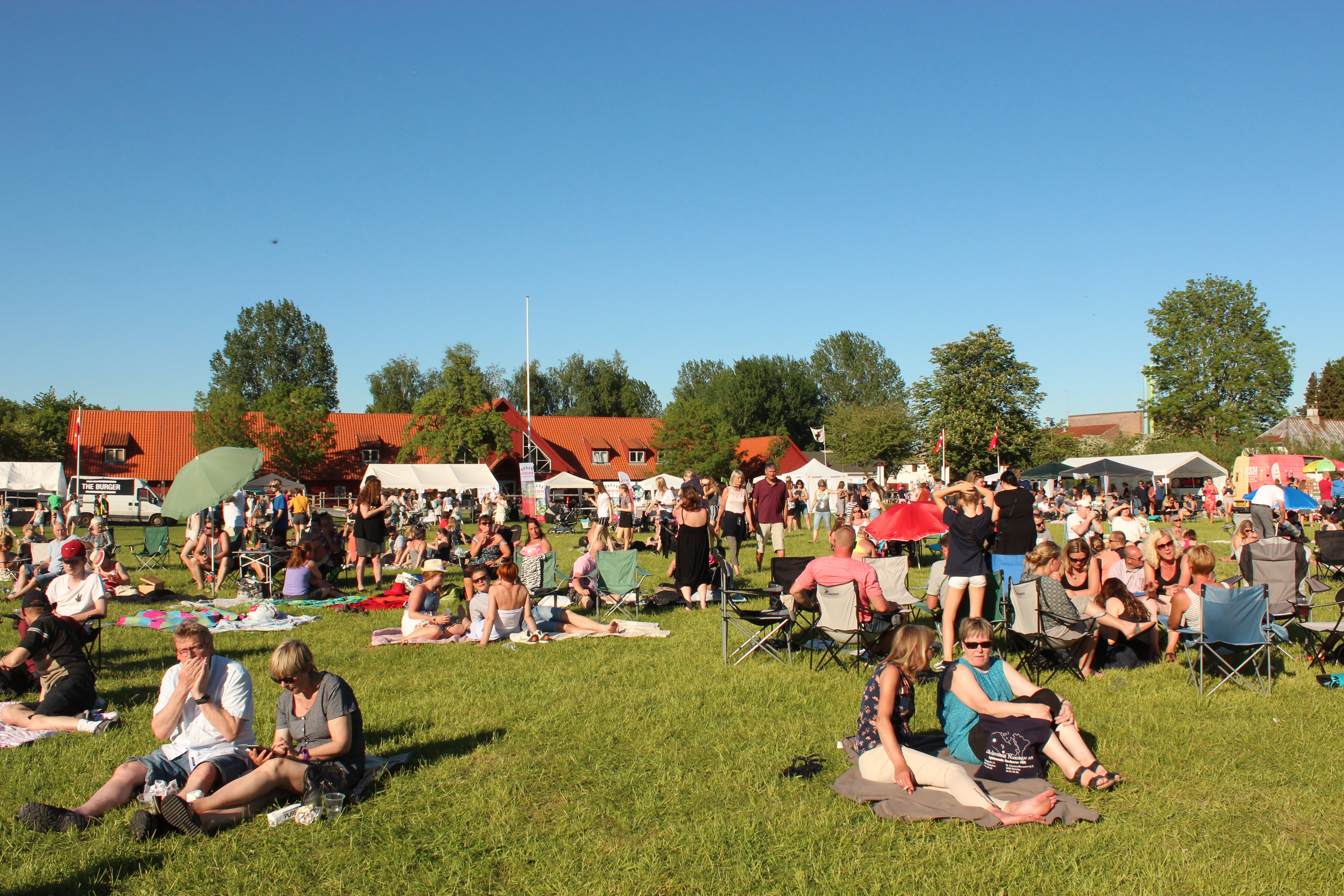 Koncertgæster ved Danmark Dejligst, 27. maj 2017. I baggrunden indgangen til Middelaldercentret.